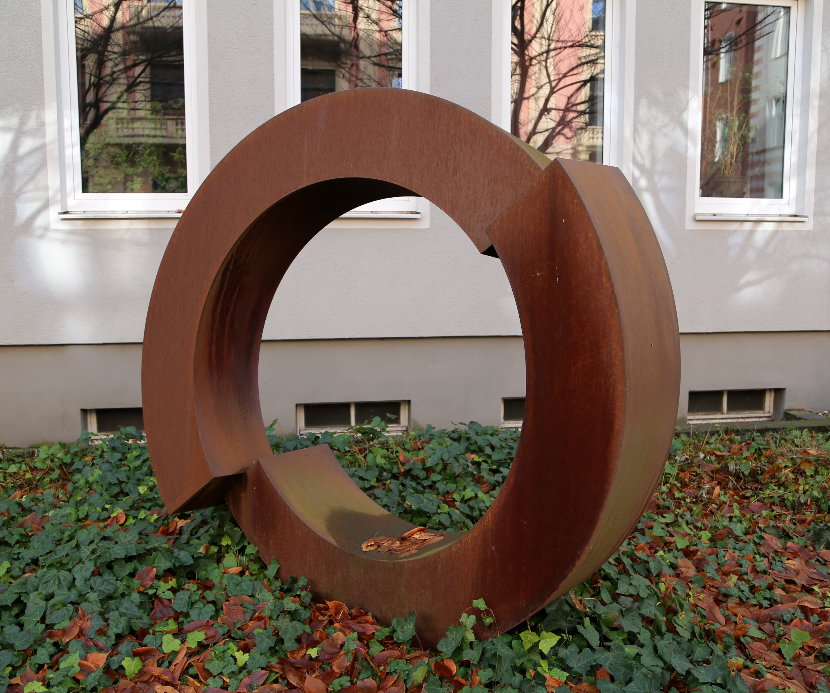 Ernst Hesse: o.T. (Bewegung), 2001, COR-TEN-Stahl, Pettenkoferstraße 21, München